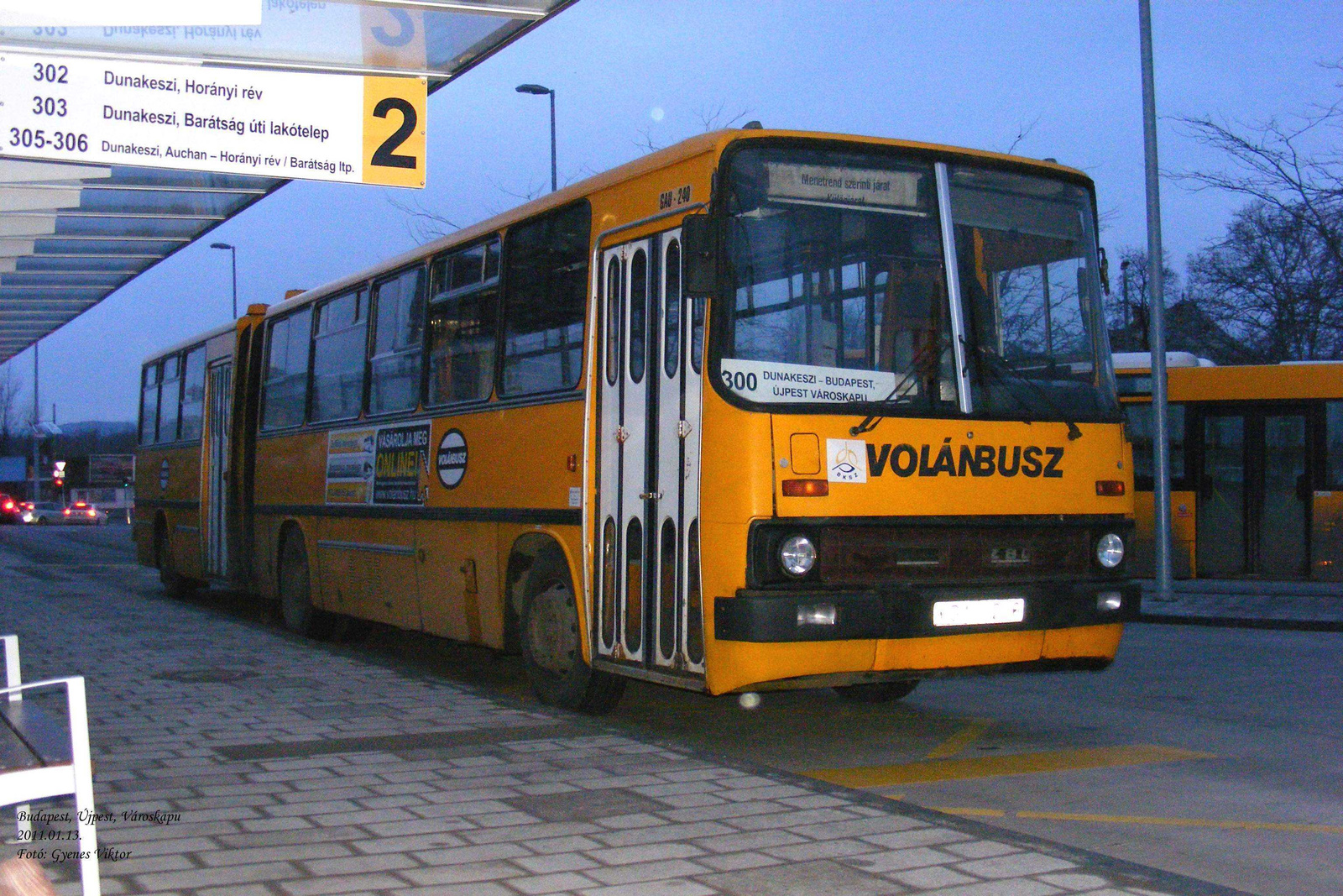 Ikarus 280-as busz Újpest-Városkapunál